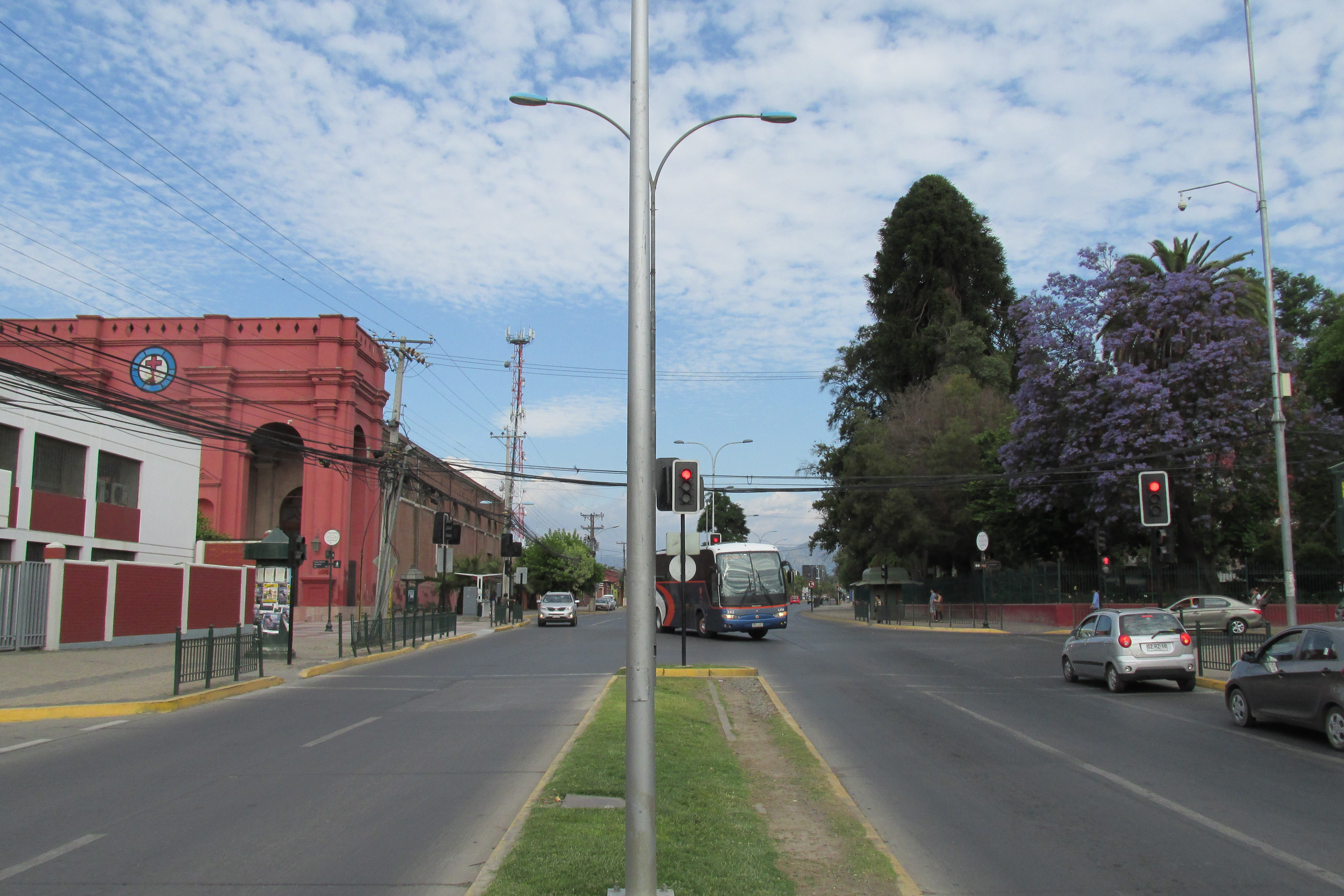 Avenida Millán en Rancagua, Sexta región Chile